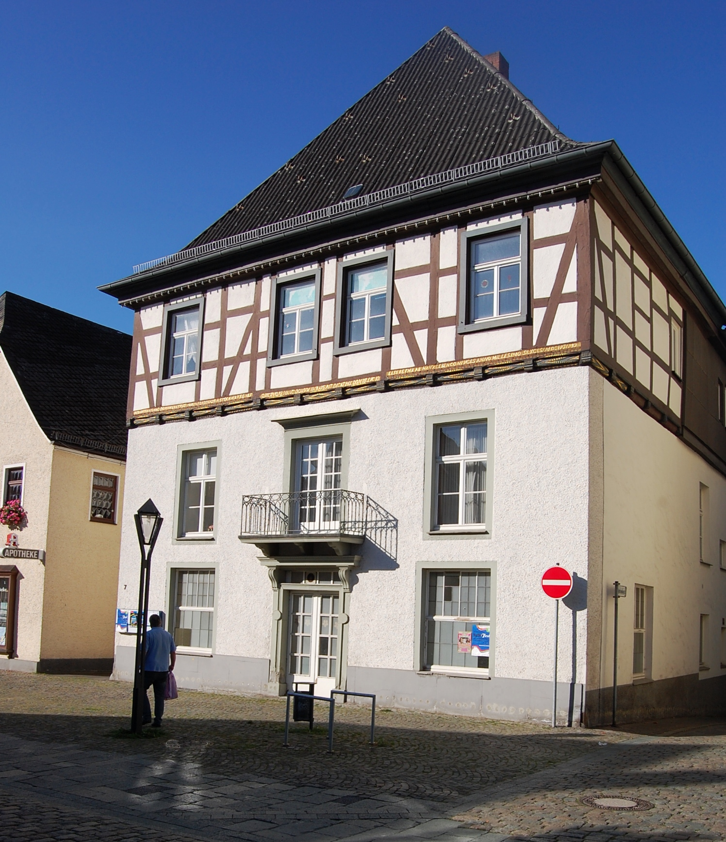 Haus Alter Markt 17, Engelapotheke/Stochausenhaus, Arnsberg